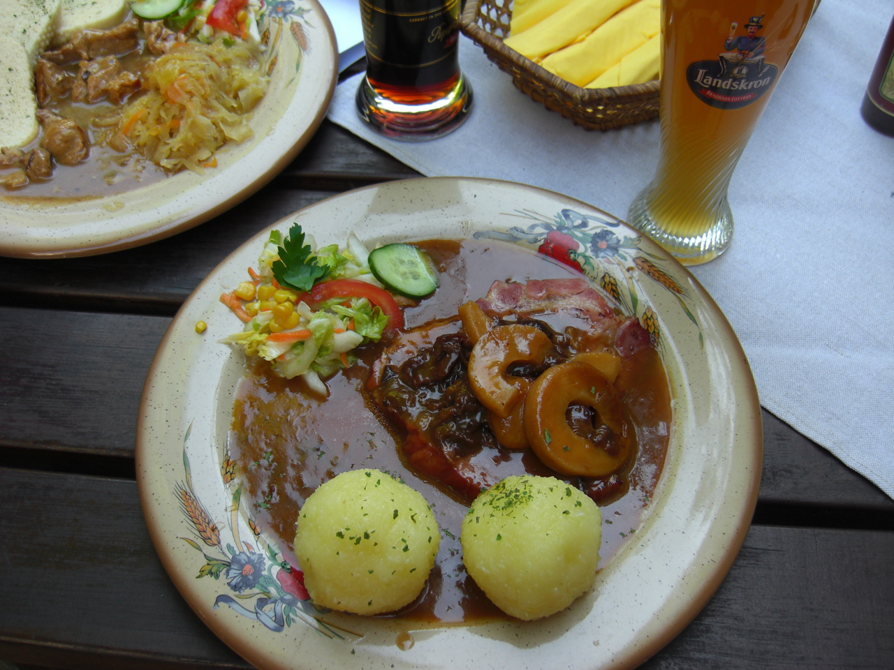 Traditional Silesian main dish